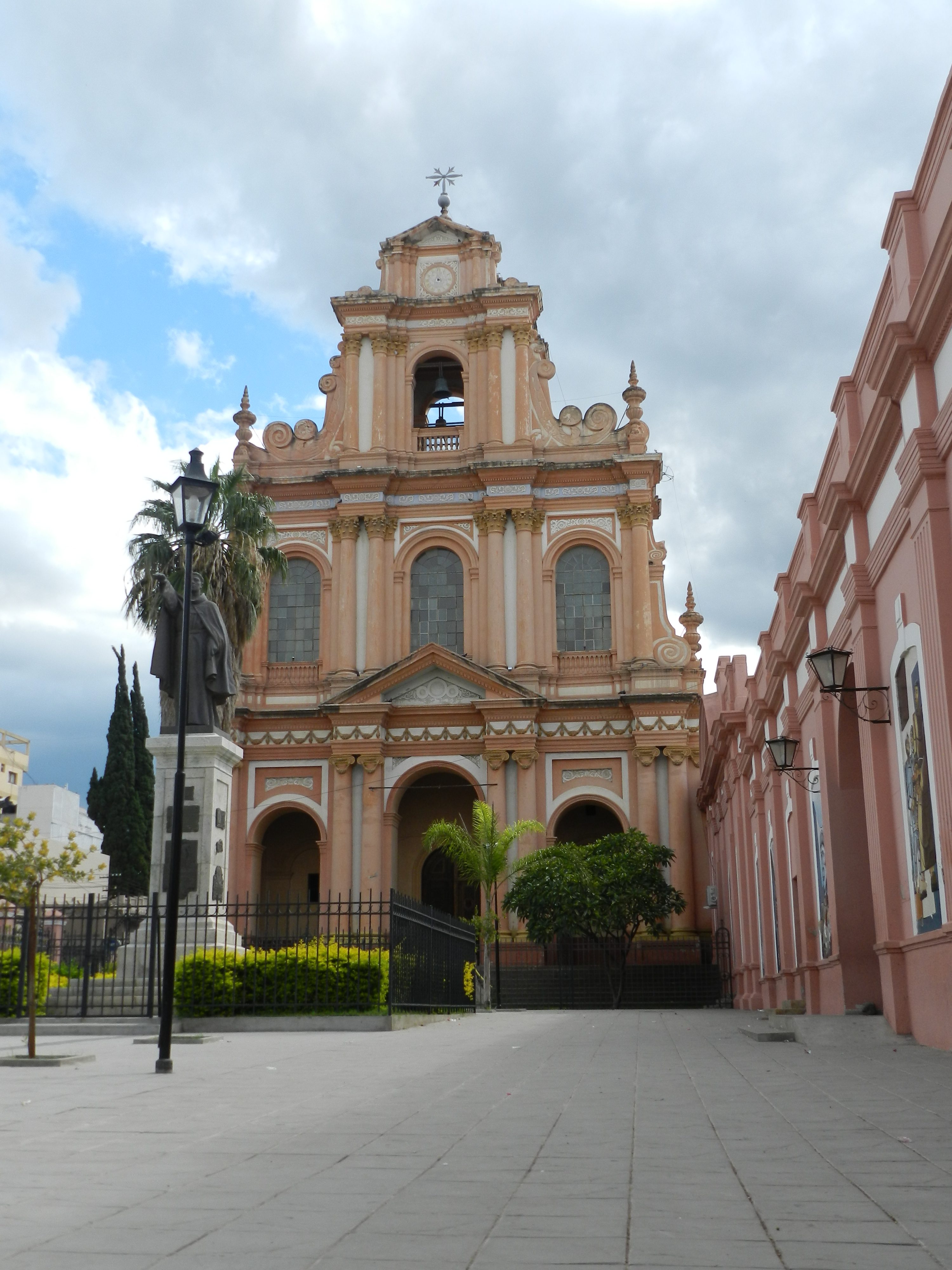 Fachada del Templo Jesuita de San Francisco y monumento a Fray Mamerto Esquiú en San Fernando del Valle